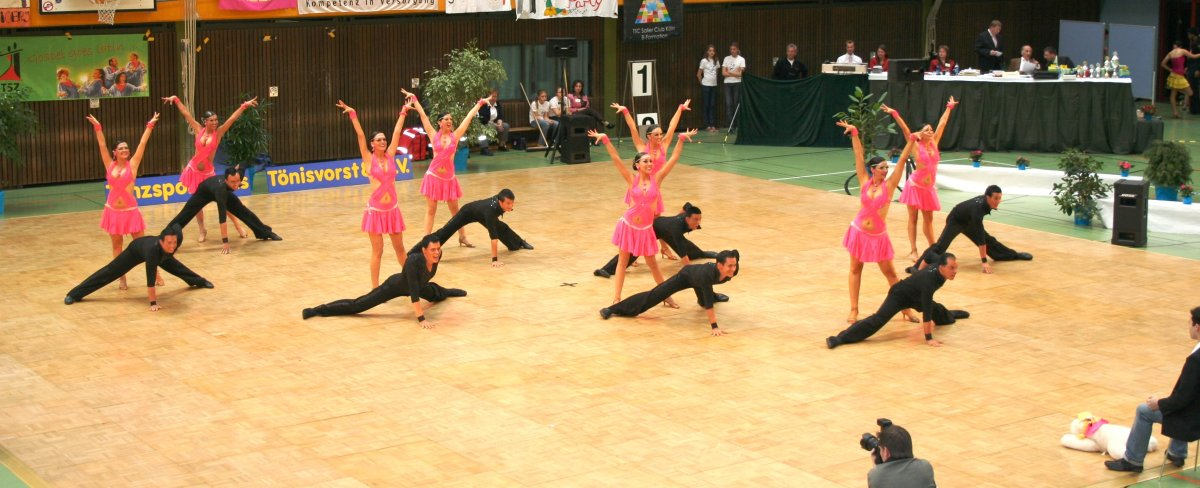 Latin Formation (Aachener ATSC Blau-Silber C-Team 2007, Germany)